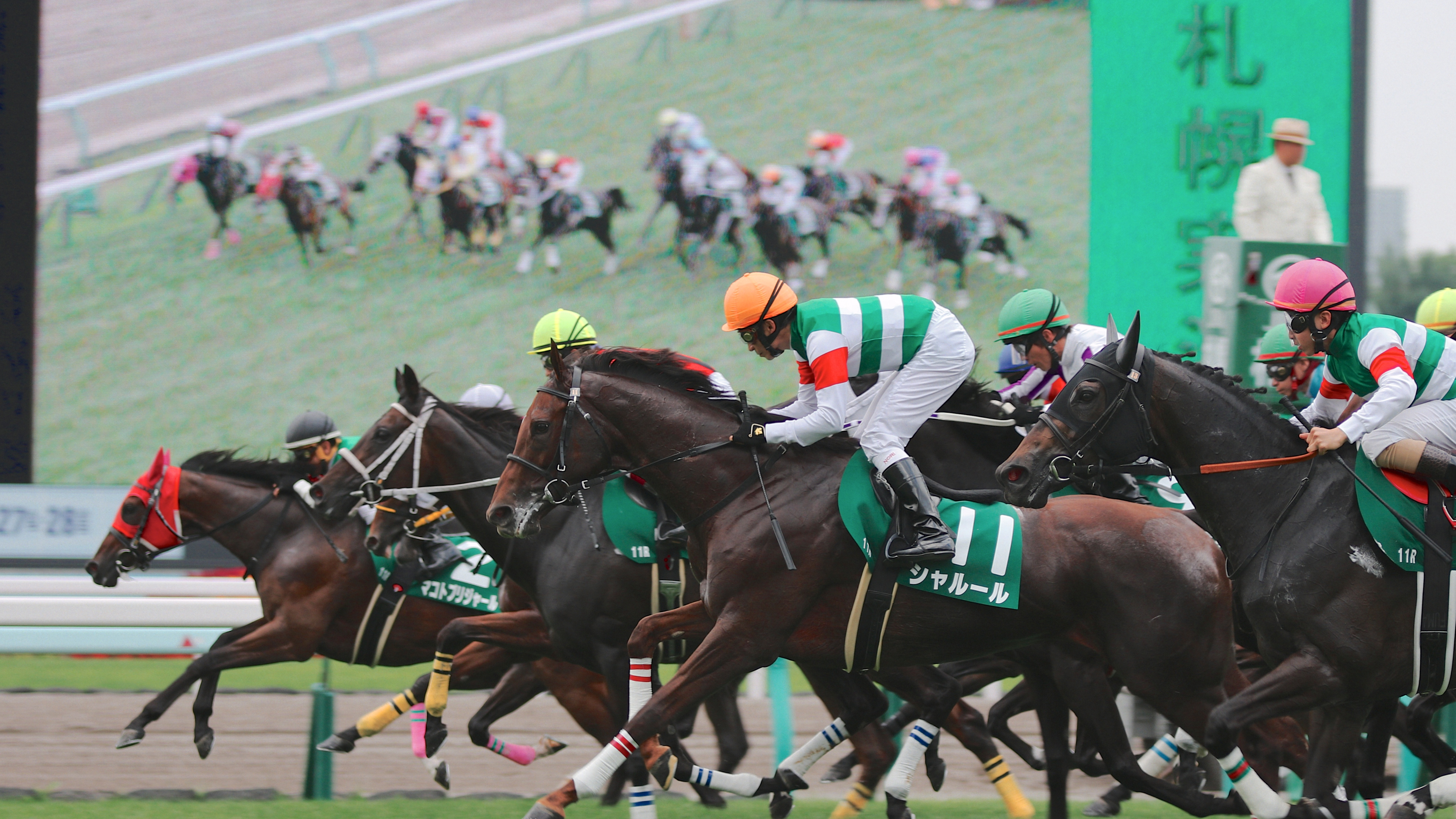 @札幌競馬場 ギャンブルはやらないんですが、馬を観にたまに行きます。